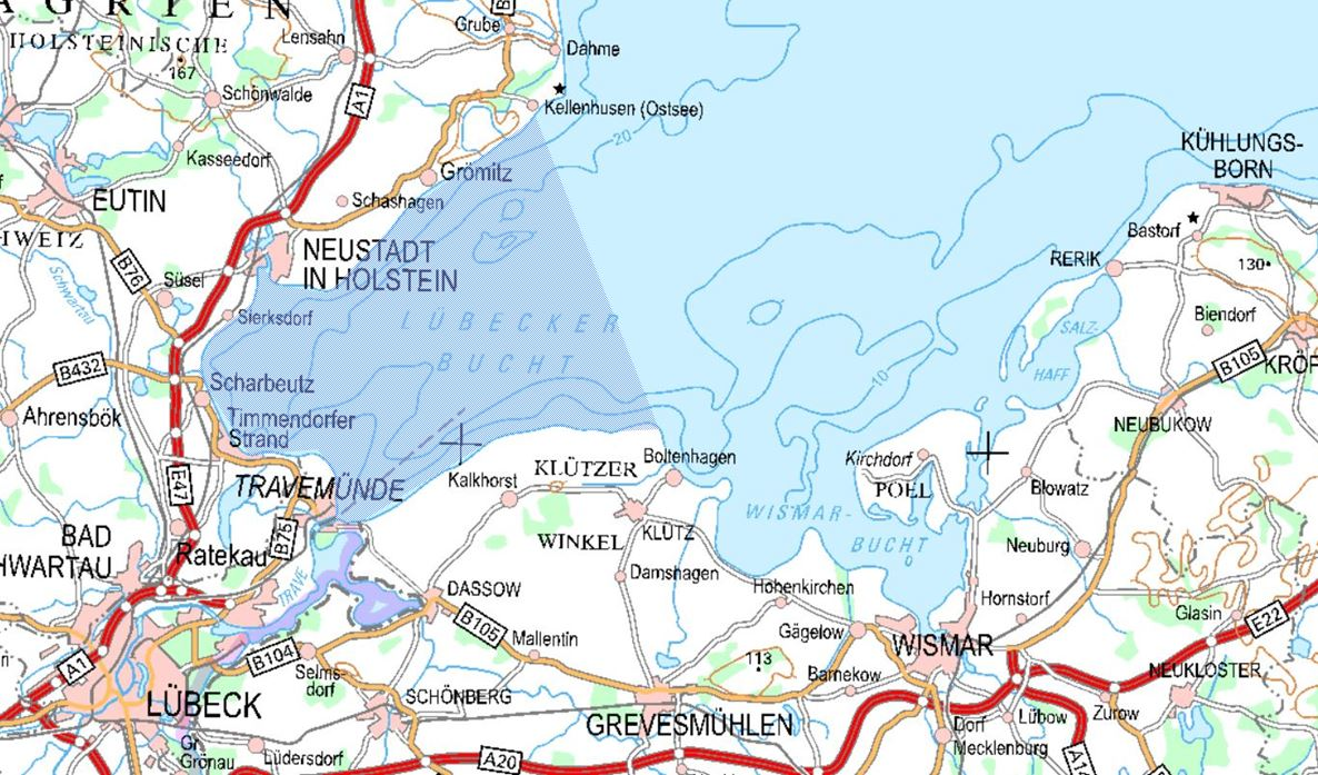 Unscharfe Abgrenzung des Seegebietes der Lübecker Bucht gem. nachstehender Quellen